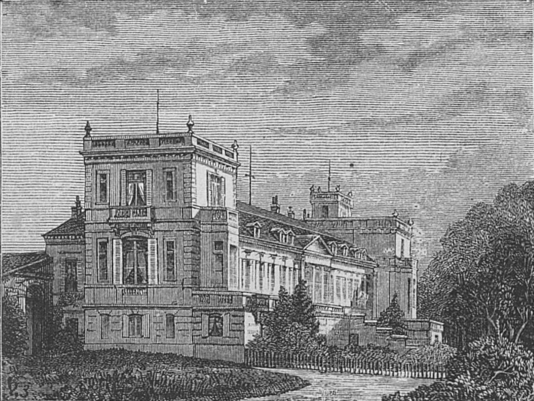 Illustration du Château Ducru-Beaucaillou dans l'ouvrage Bordeaux et ses vins (6ème édition) de Charles Cocks et Edouard Féret publié en 1893